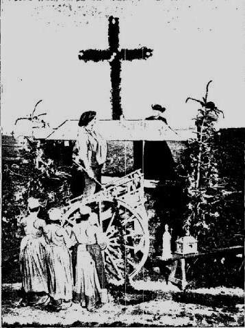 Préparation d'un reposoir à Sainte-Anne-la-Palud dans le département français du Finistère en 1903.